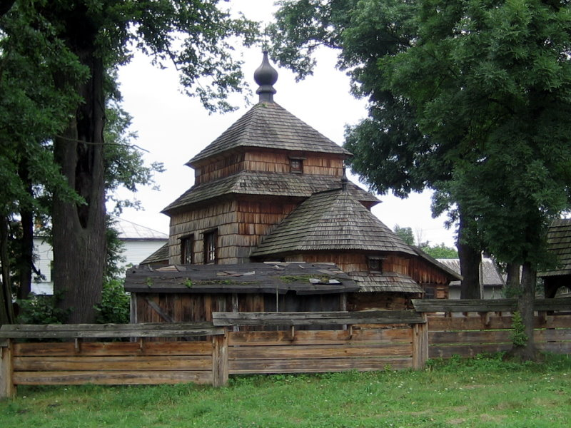 Łukawiec (Poland), Greek Catholic churchCerkiew greckokatolicka pw. św. Dymitra Męczennika z 1701 r.